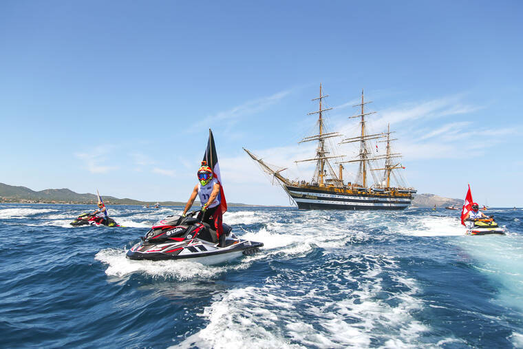 I piloti del mondiale Aquabike accolgono l'arrivo del Veliero della Marina Militare a Olbia